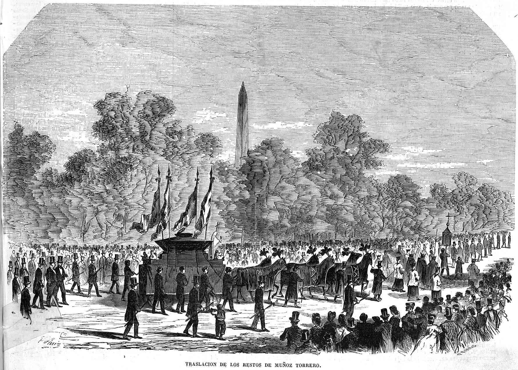 «Traslación de los restos de Muñoz Torrero», en la revista española El Museo Universal.